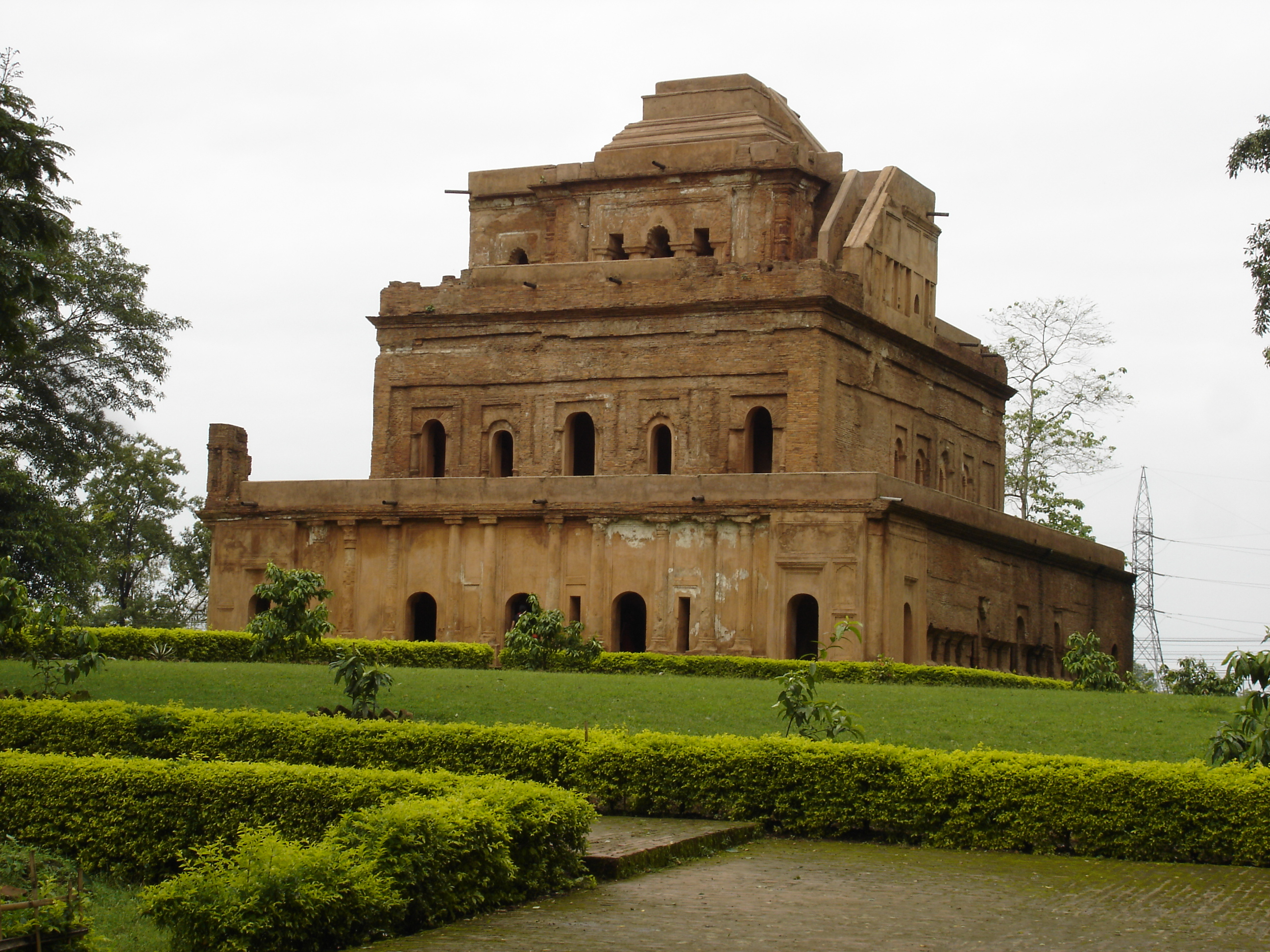 অসমীয়া: গড়গাঁওৰ কাৰেংঘৰ